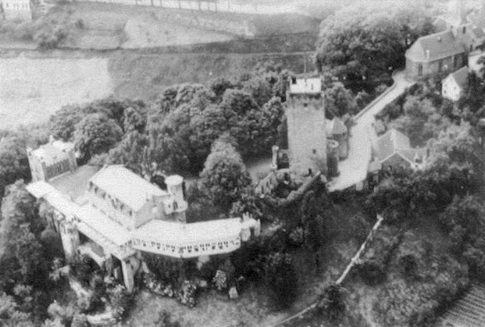 Luftbild der Burg Blankenstein